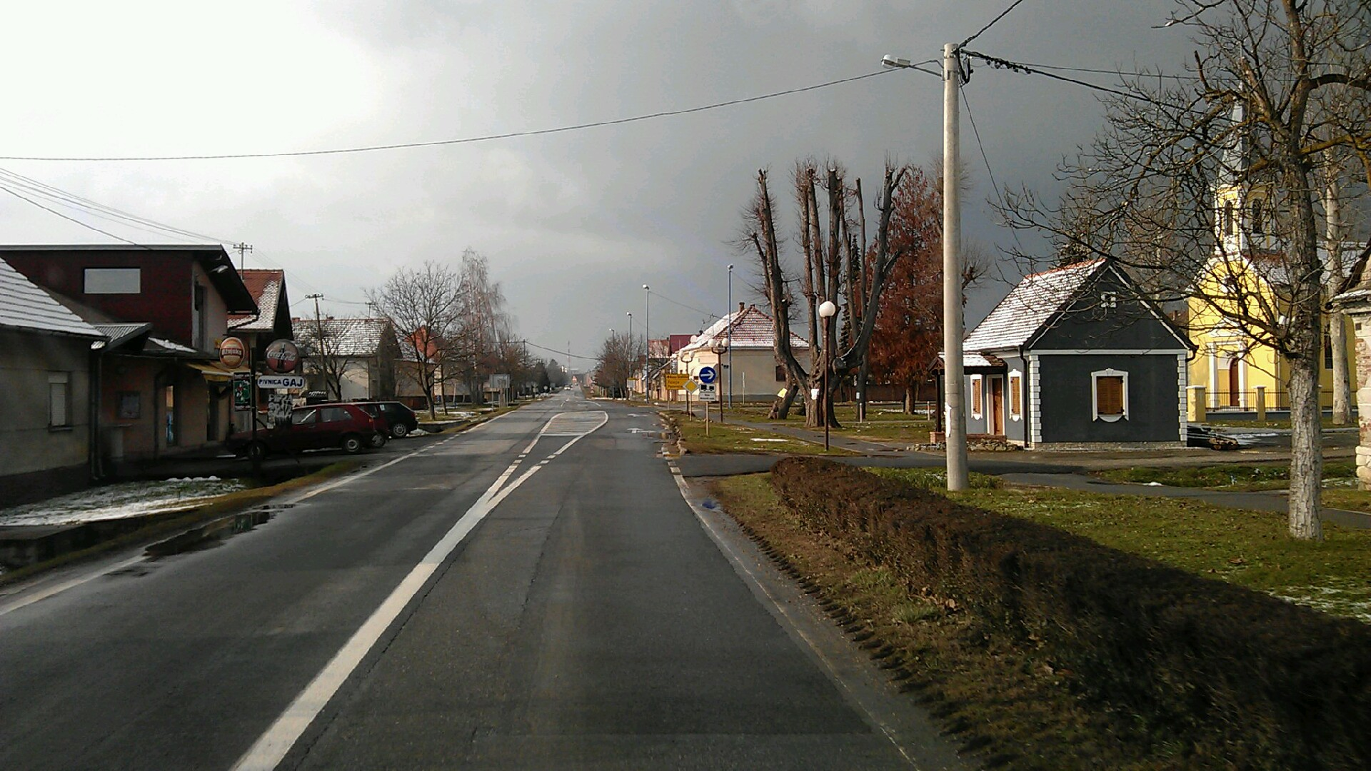 Batrina